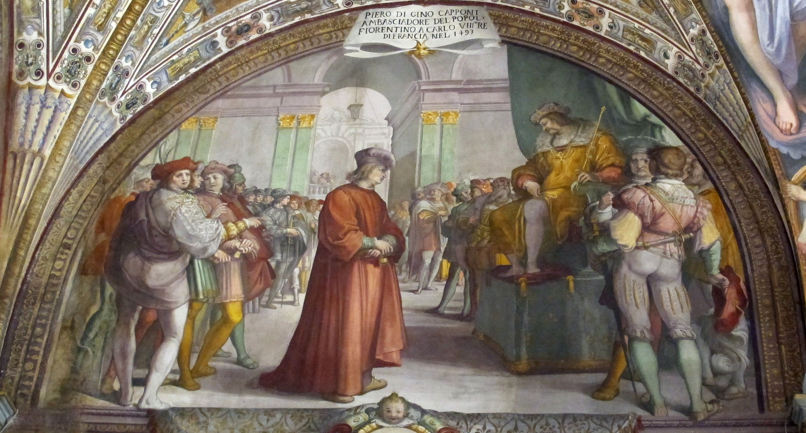 Palazzo capponi-vettori, salone poccetti, 01 lunetta con piero di gino capponi da carlo VIII di francia 2